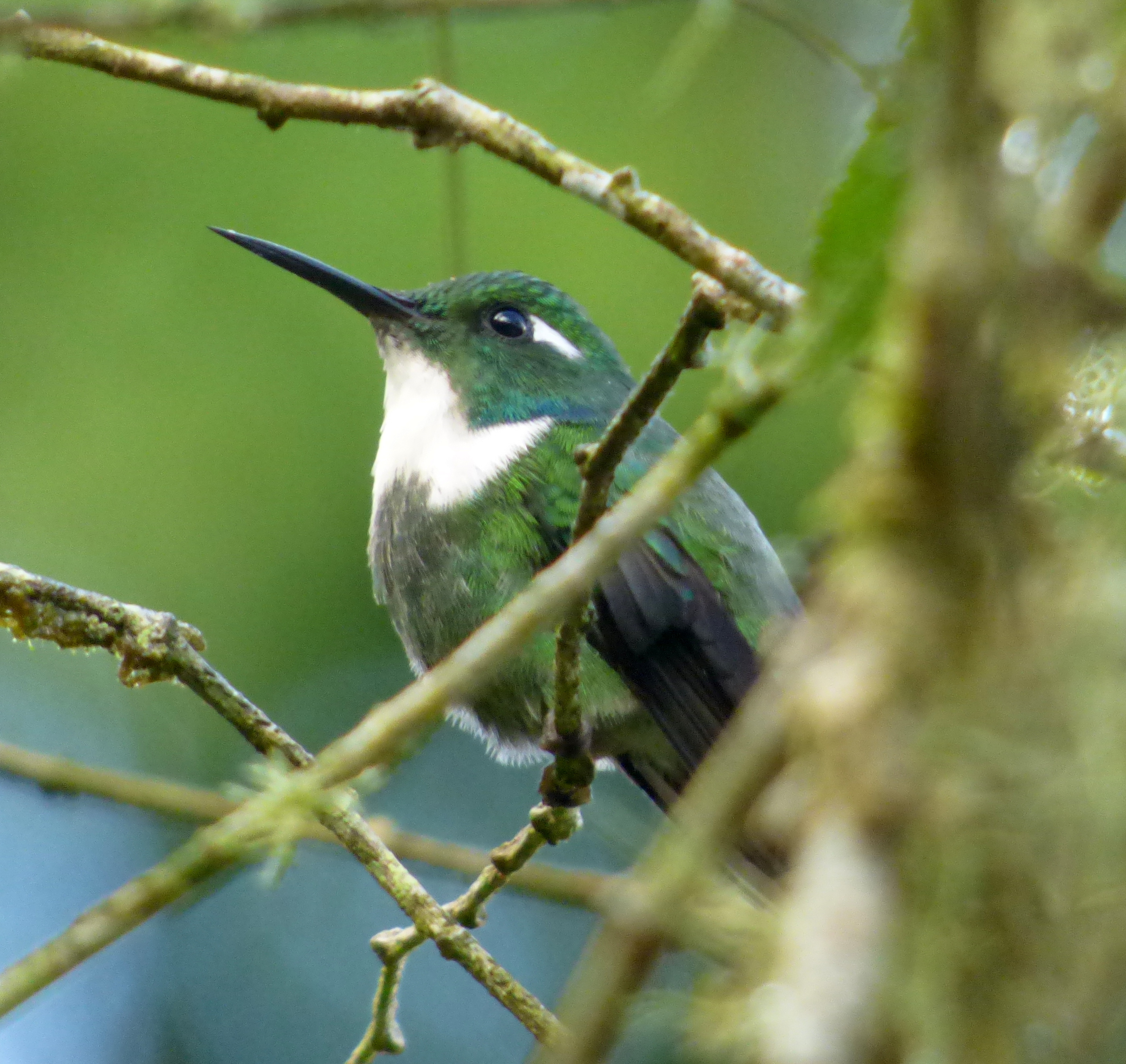 Schistes geoffroyi (Pico de cuña)